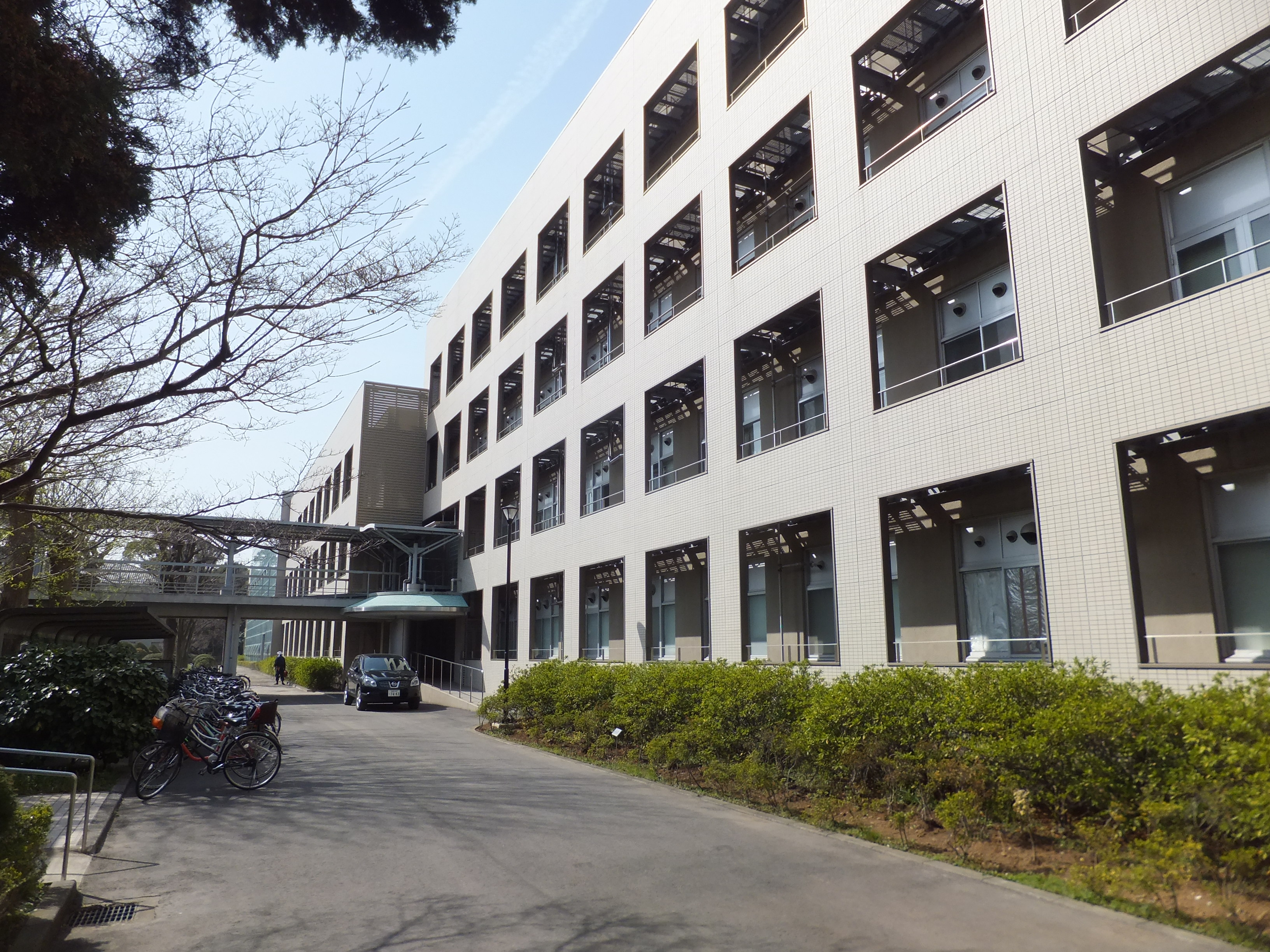 千葉大学松戸キャンパスC棟